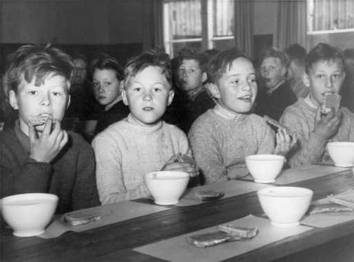 Oslo breakfast (school meal) in 1956. Oslofrokost i 1956.